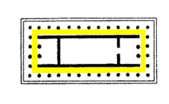 peridromo tempio greco